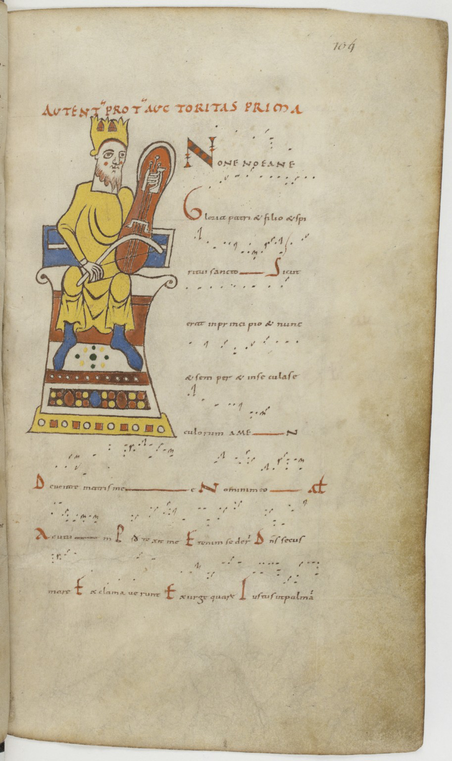 Lehekülg 11. sajandi tonarius'est, esimene toon, illustratsioonil kuningas Taavet